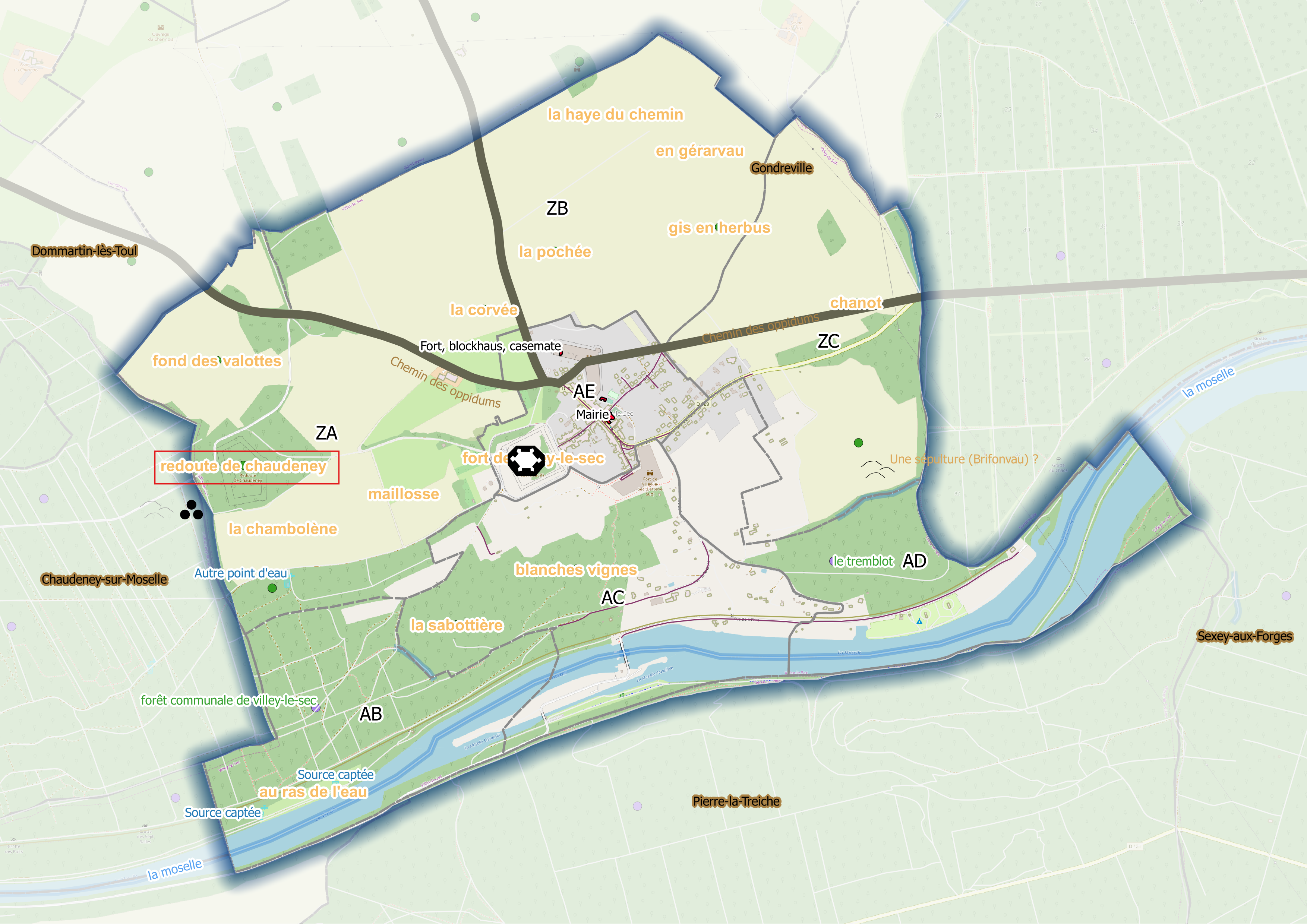 Fig1 Villey le sec (Ban communal) Osm et Qgis